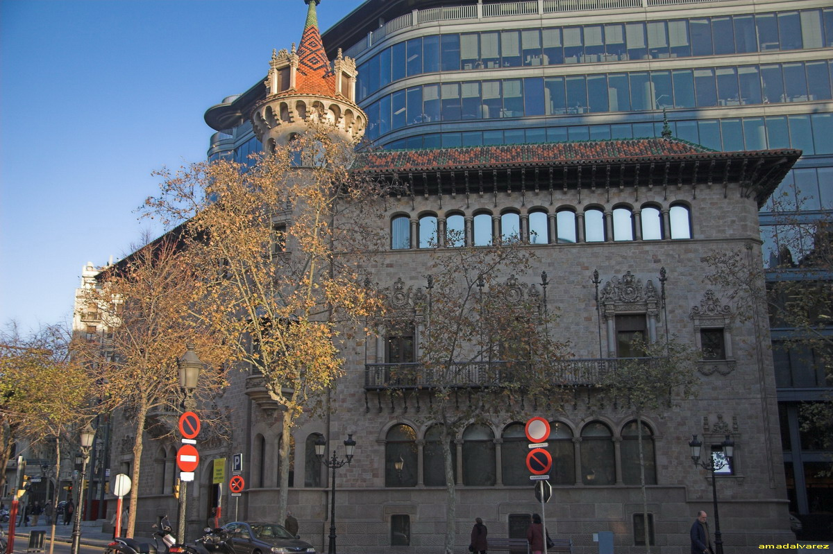 Casa Serra(Barcelona-Catalunya), obra de Josep Puig i Cadafalch 1903. Rbla.Catalunya, 112. Vista general.